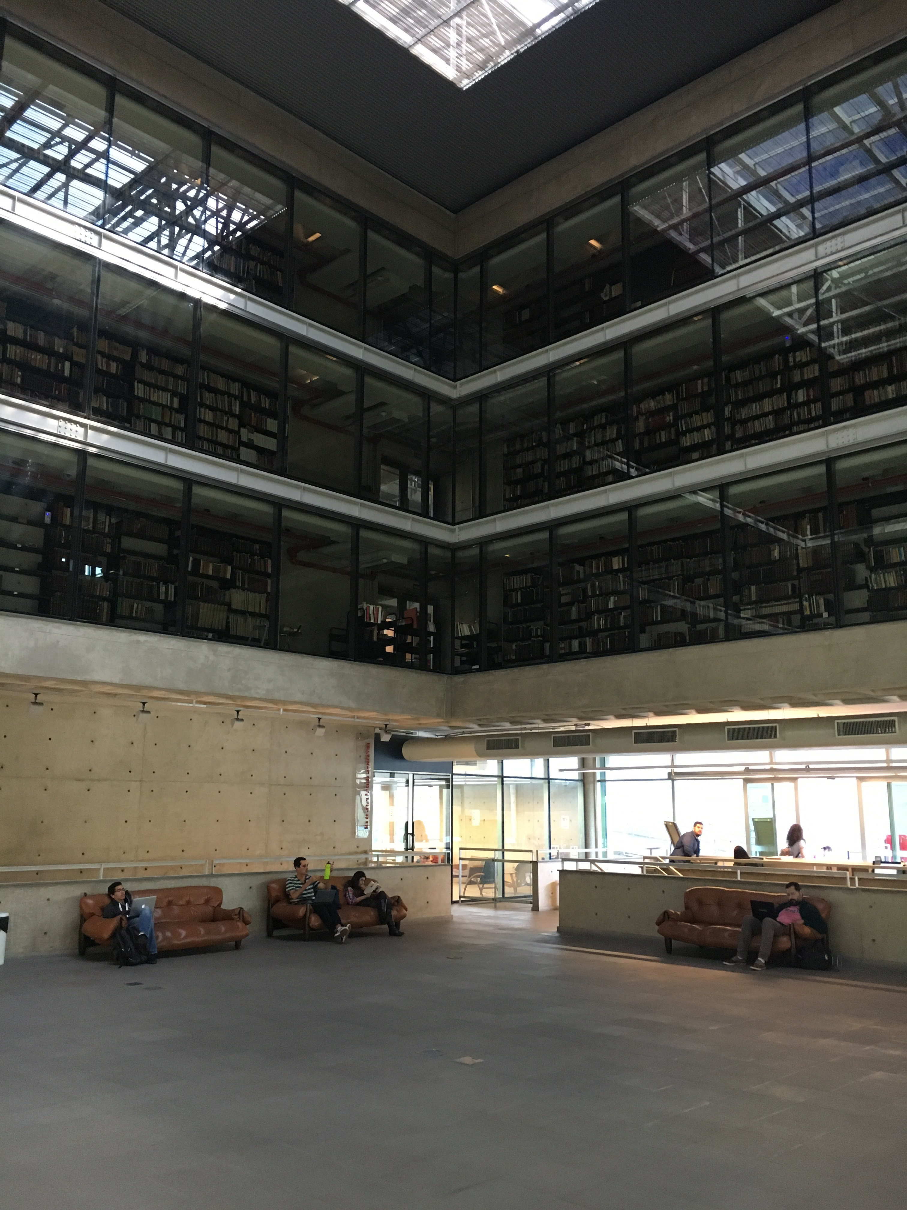 Área térrea da biblioteca, pequena exposição.